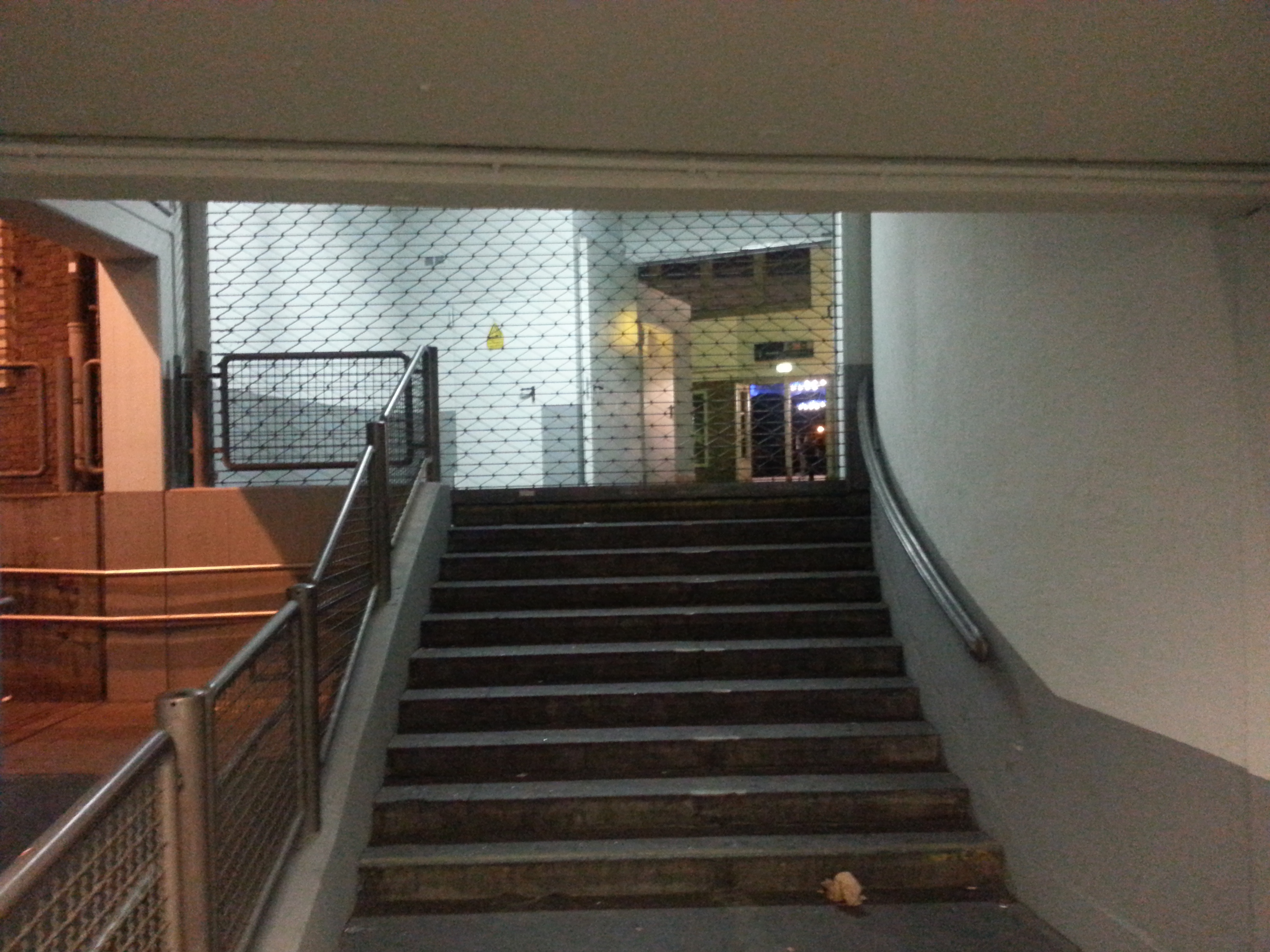 Bahnhof Benrath Ausgang Richtung Busbahnhof mit nächtlichem Absperrgitter vor dem Haupteingang.